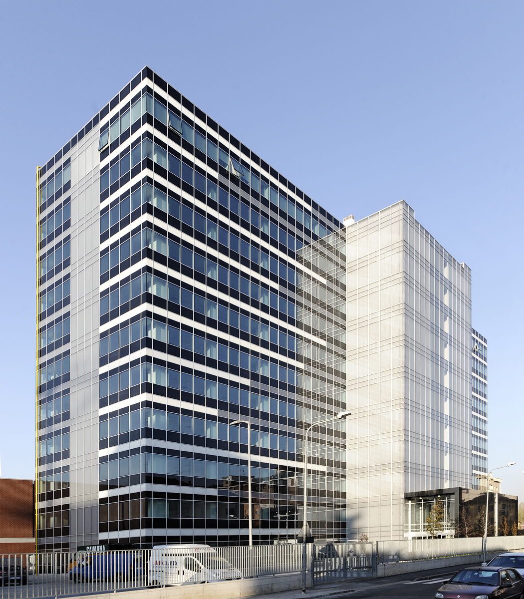 Sede di Aviva a Milano : Light building